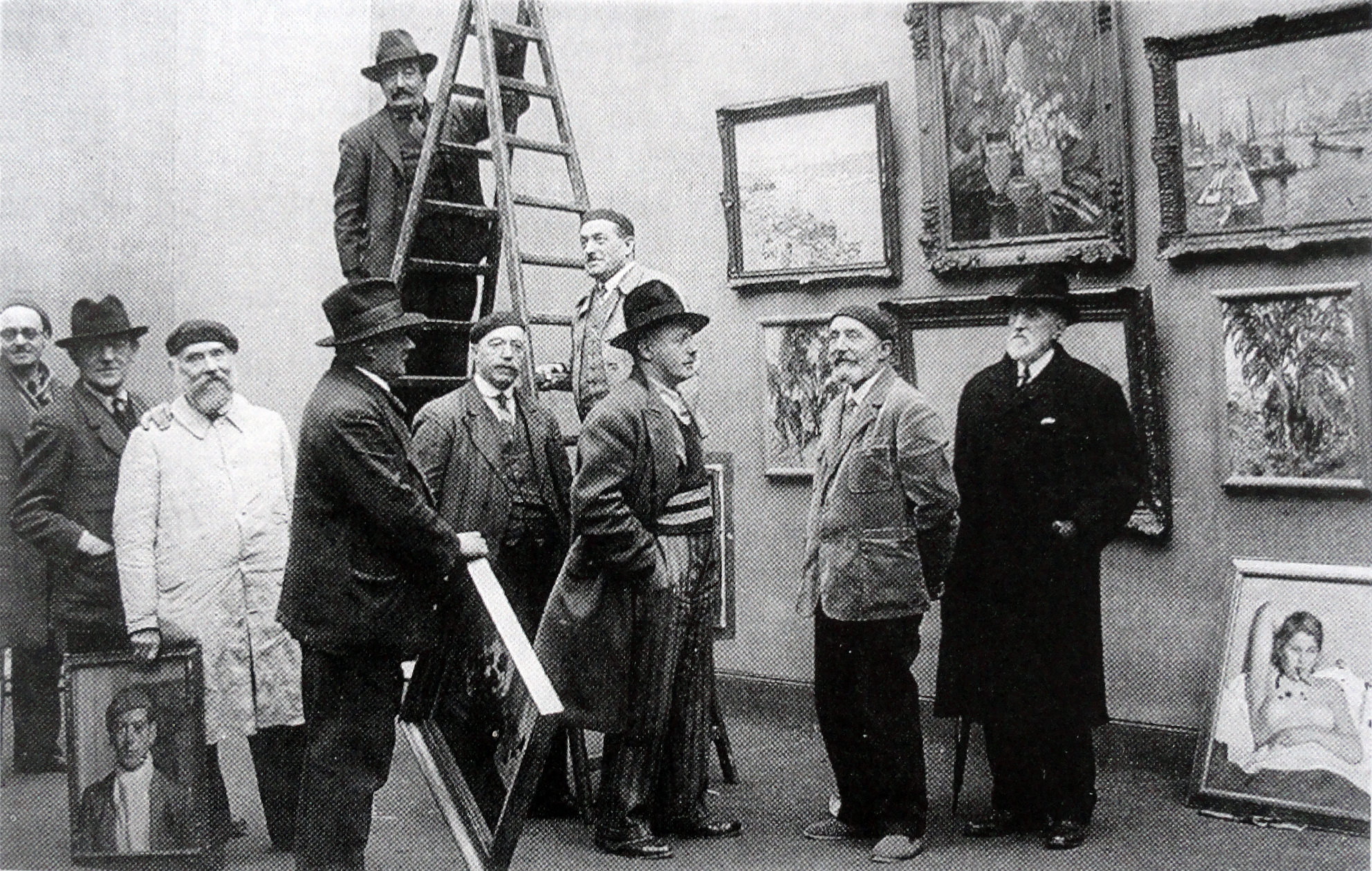 A l'accrochage du Salon des Artistes Rouennais, Musée des Beaux-Arts de Rouen, Robert Antoine Pinchon (centre), 1934